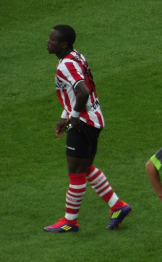 Burundyjski piłkarz Saïdi Ntibazonkiza. Zdjęcie zrobione podczas spotkania Cracovia Kraków - Korona Kielce w T-Mobile Ekstraklasie.